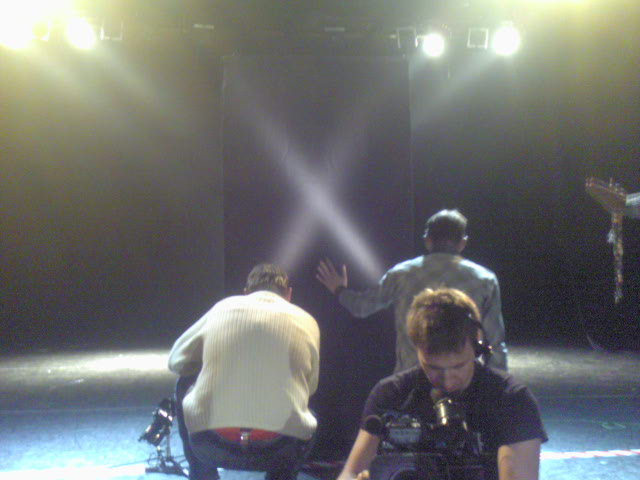 Беларуская (тарашкевіца): Бітва экстрасэнсаў